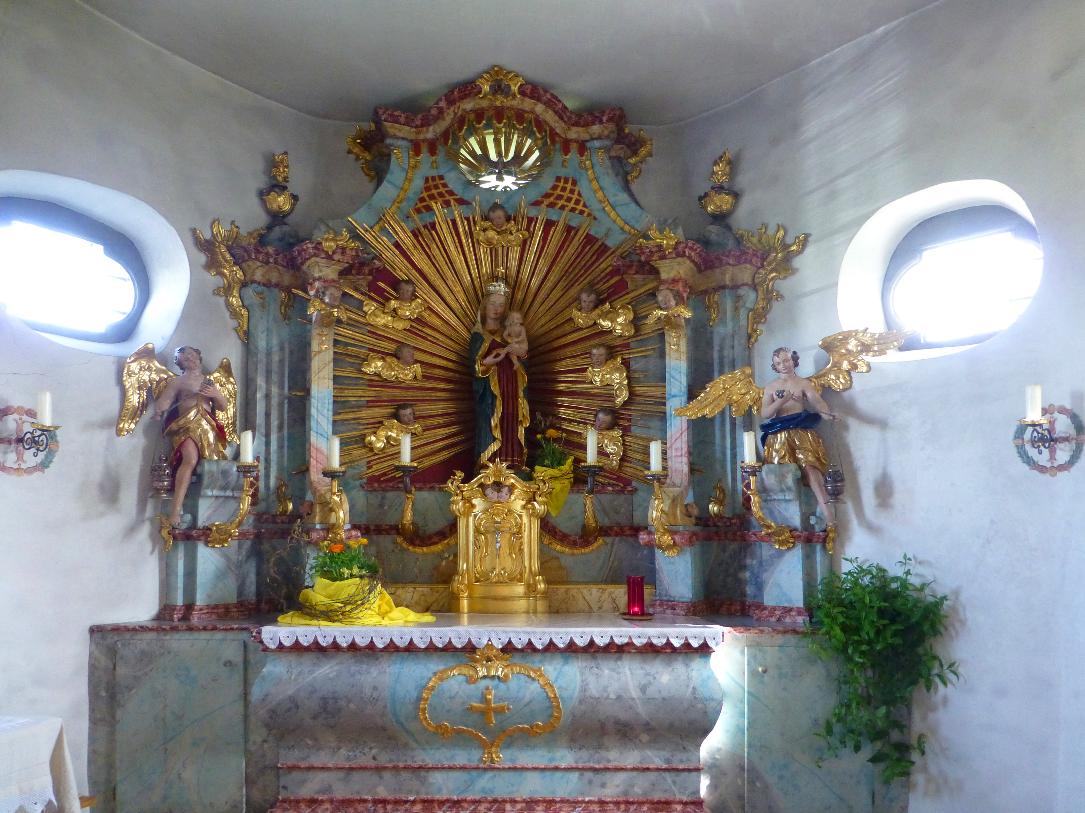 Hochaltar der Loretokapelle in Lustenau